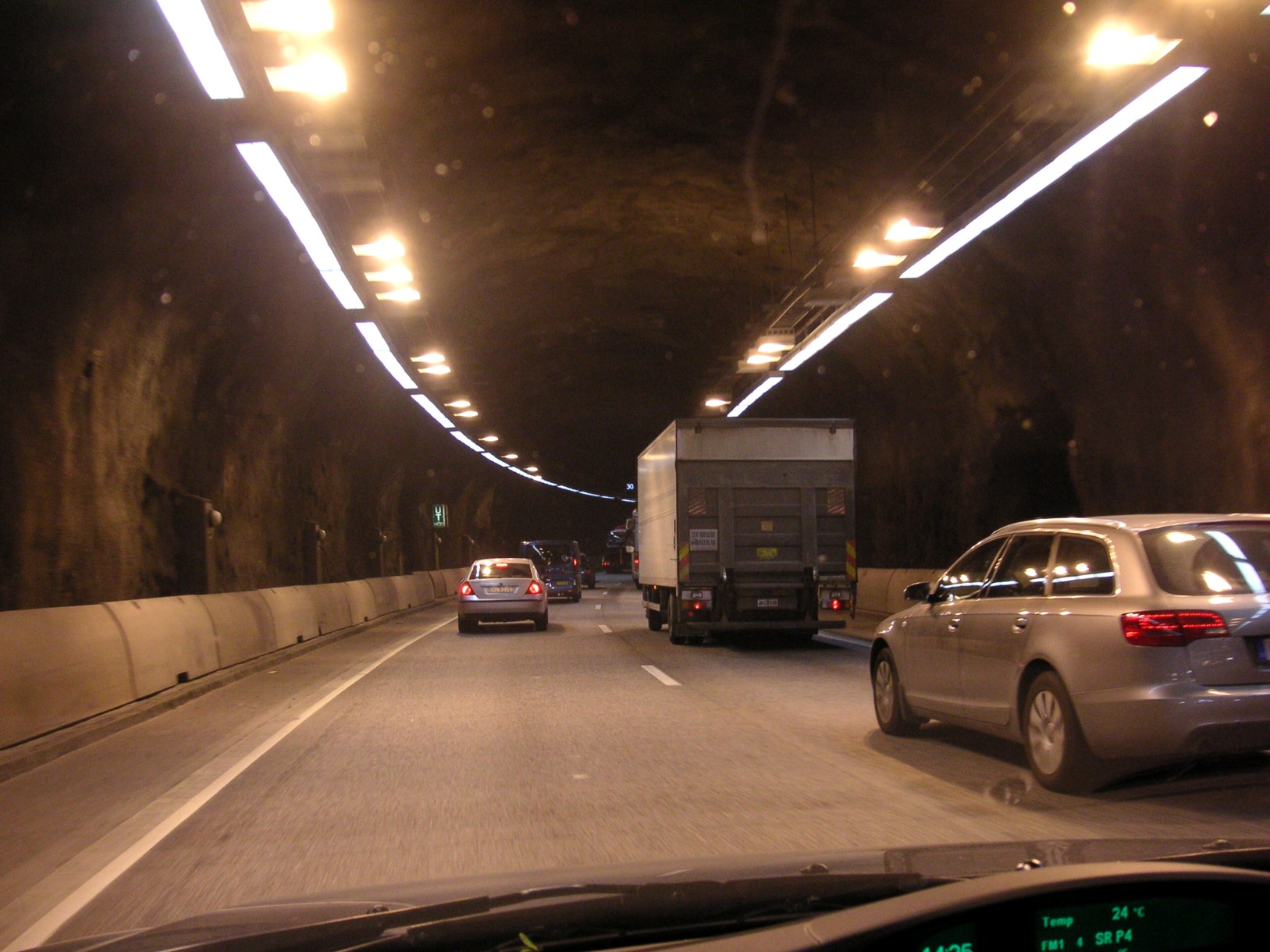 I Eugeniatunneln (södergåendegående) i Stockholm